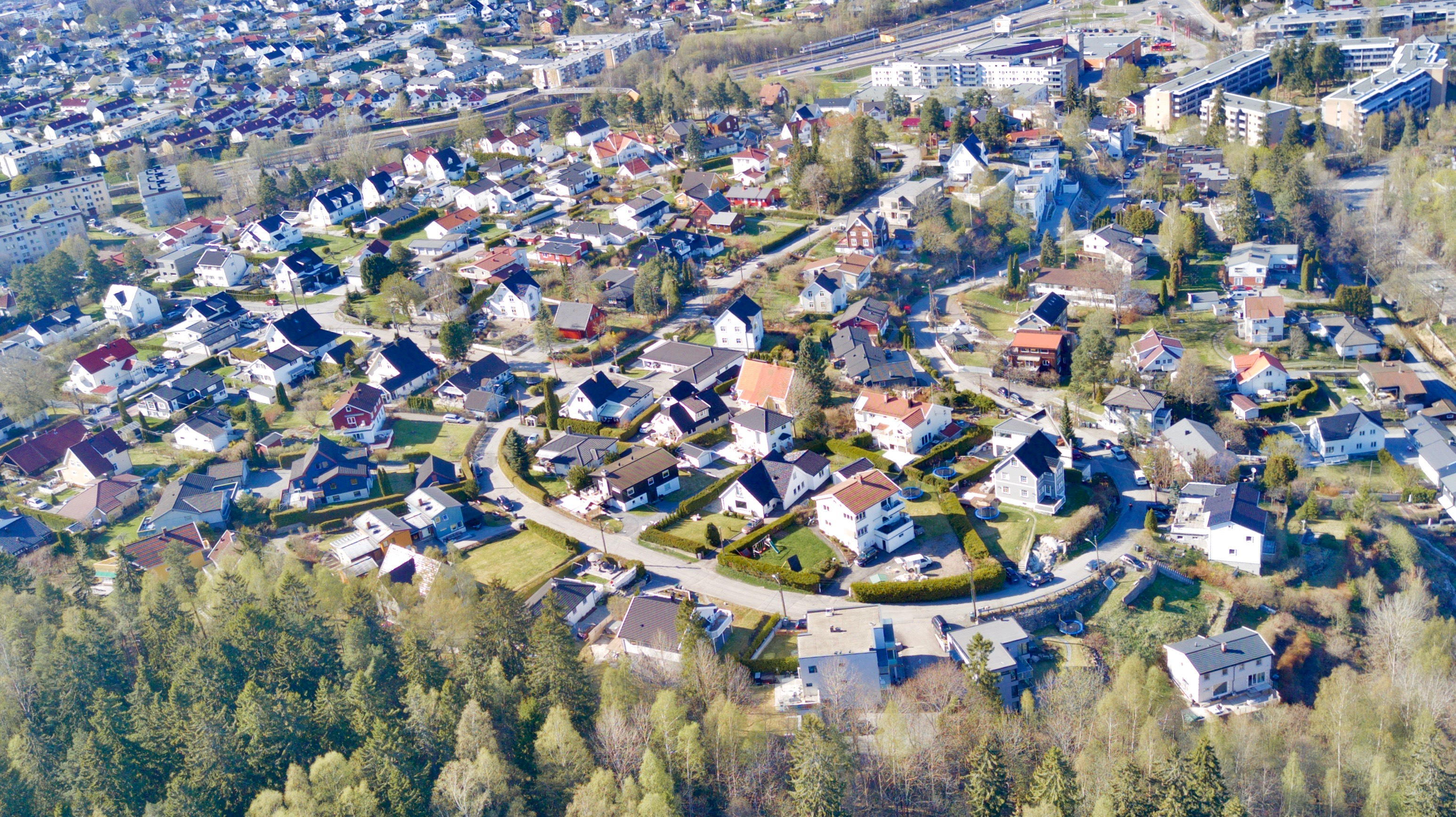 Rognerud i Oslo.